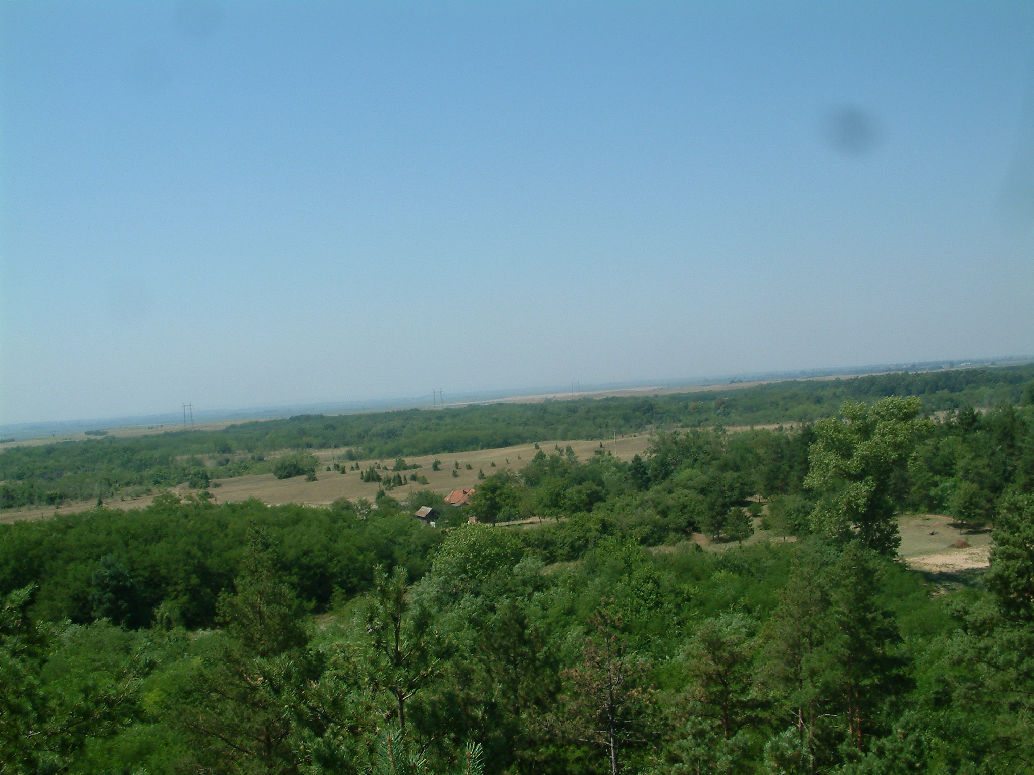 Deliblati puszta